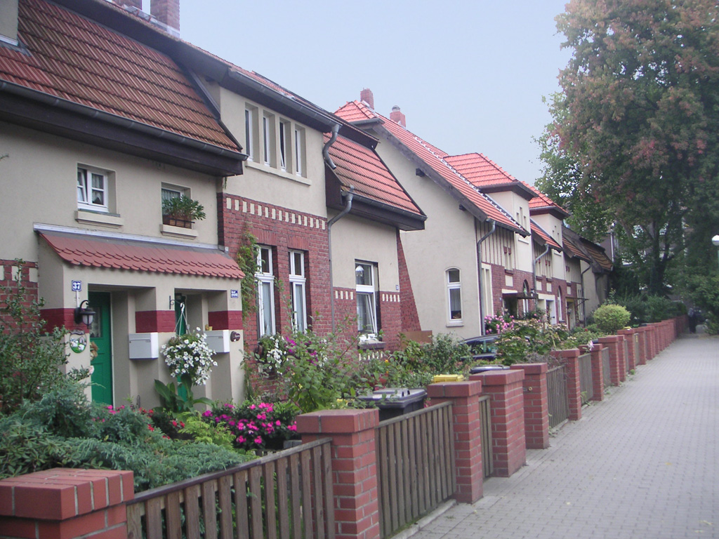 Beschreibung: Restaurierte Zechensiedlung in Gelsenkirchen (Steinmetzstraße). Description: Redeveloped coillery housing estate in Gelsenkirchen (Steinmetzstraße). Quelle/Source: Fotografiert am 25. September 2004 Fotograf: Marc Schuelper